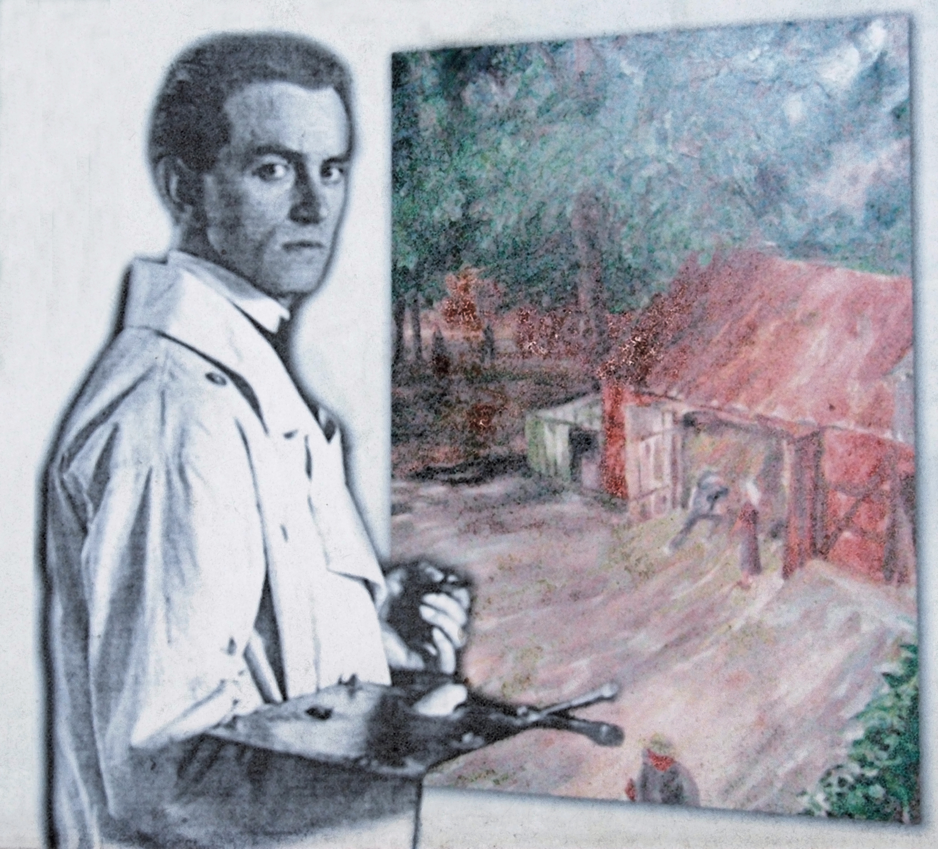 Fritz Flebbe an der Staffelei - Bild aus der öffentlichen Infotafel in Müden (Örzte)